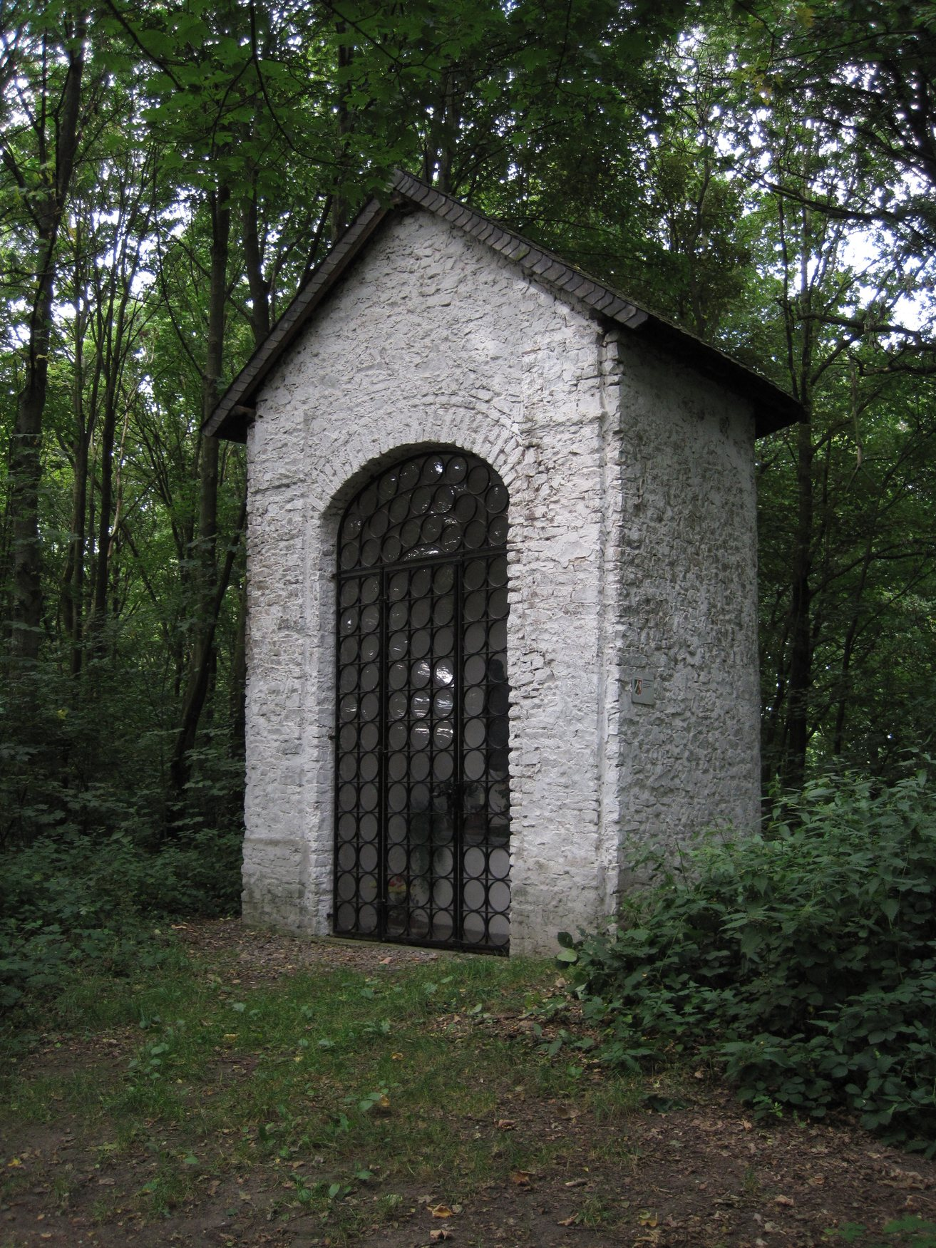 Kapelle auf dem Hülsenberg in Langerwehe; Infotafel siehe File:Huelsenberginfo.jpg This is a photograph of an architectural monument.